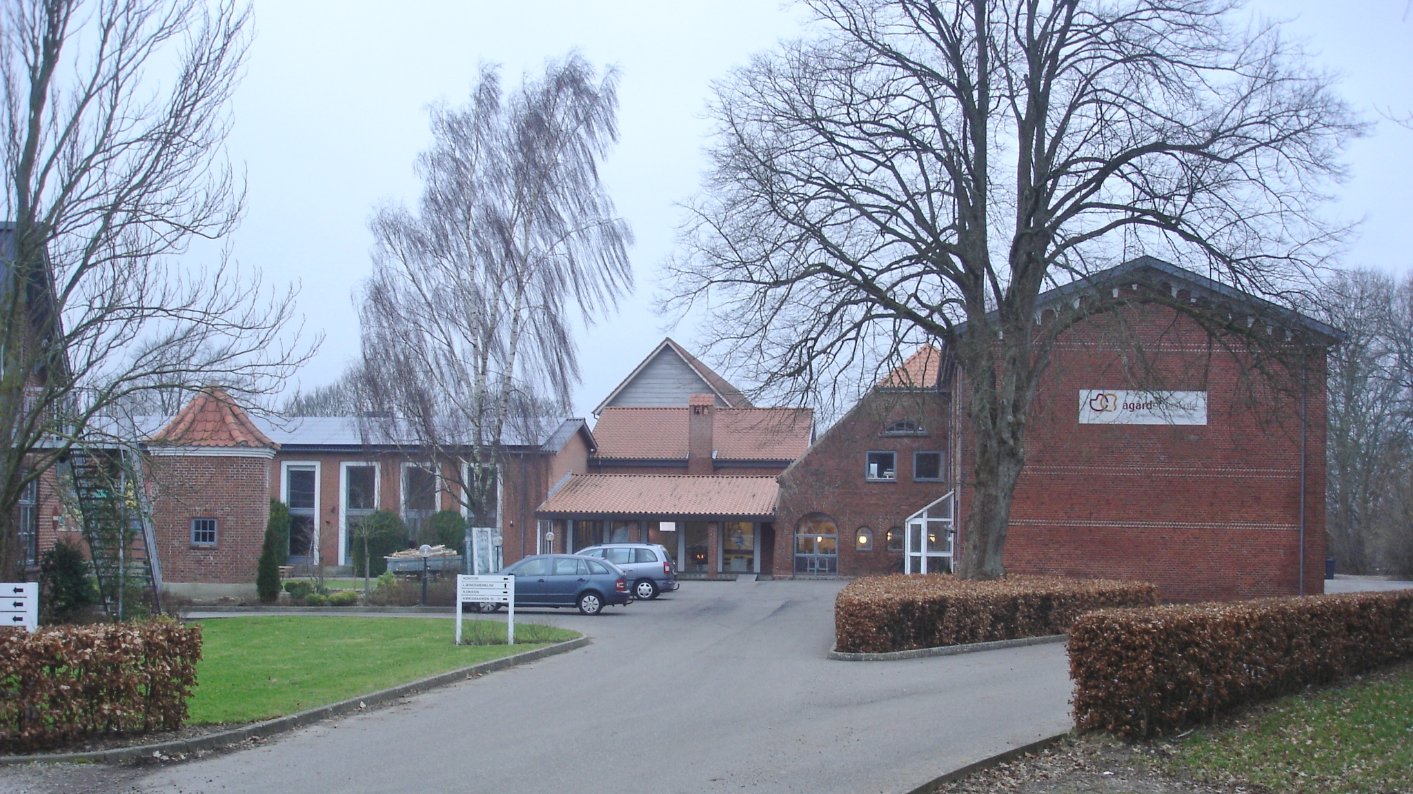 Ågård Efterskole